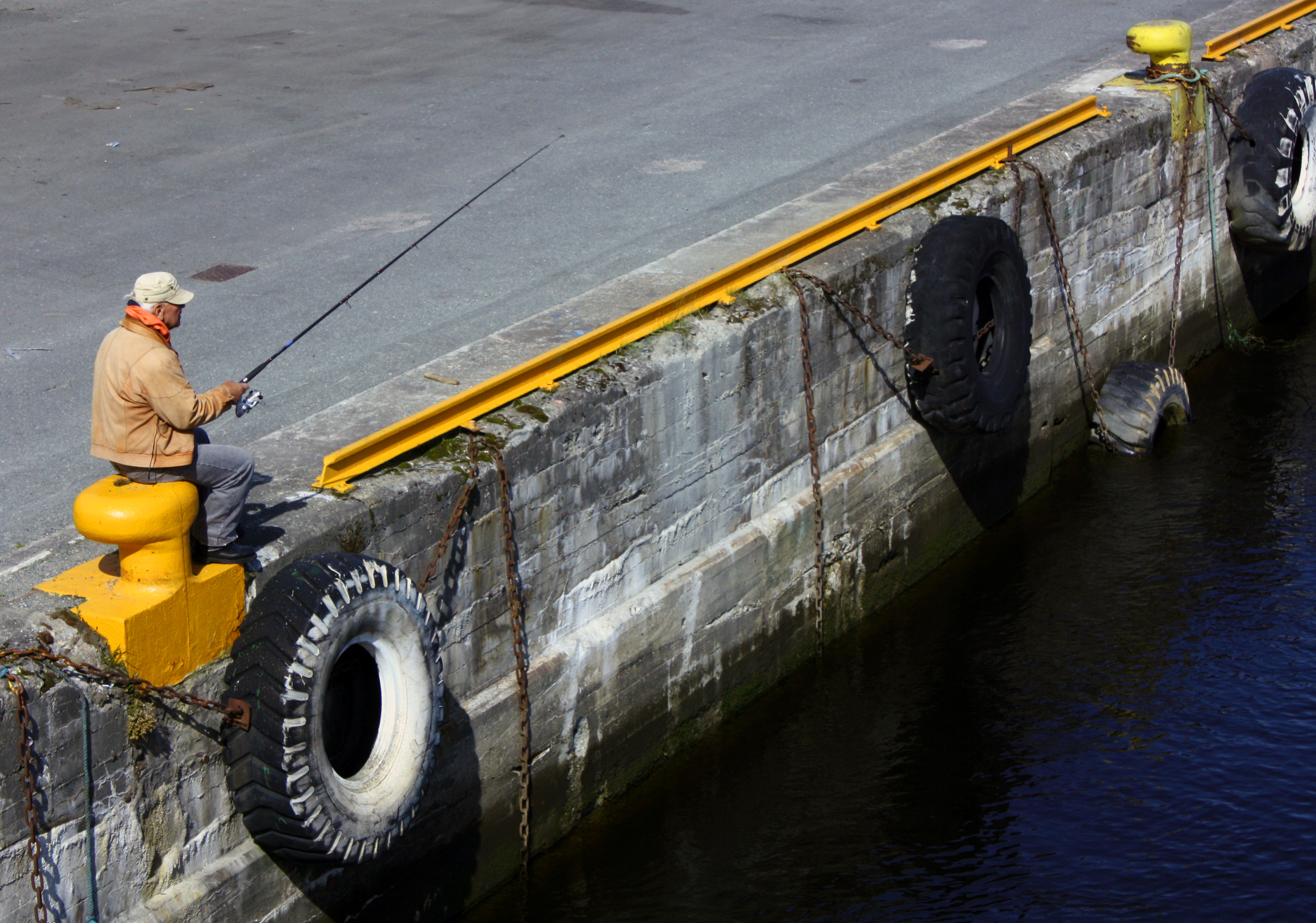 En trondhjemmer fisker i Nidelva fra kaikanten på Brattøra.